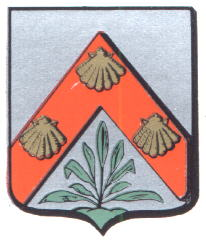 Wapen Lissewege